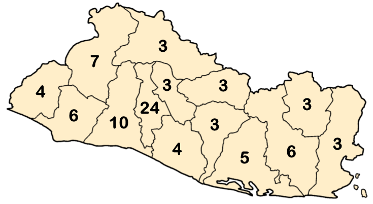 Distribución de diputados por circunscripción